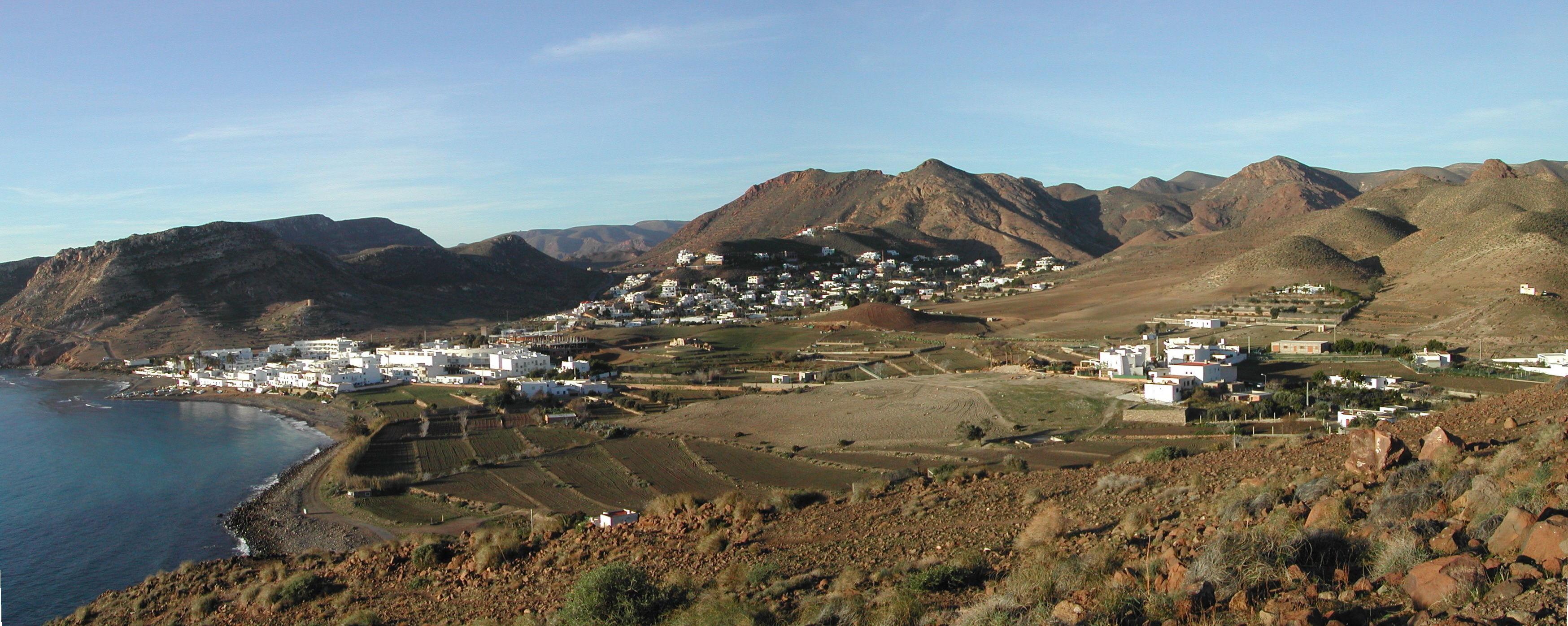 Panorámica de Las Negras desde el camino a San Pedro